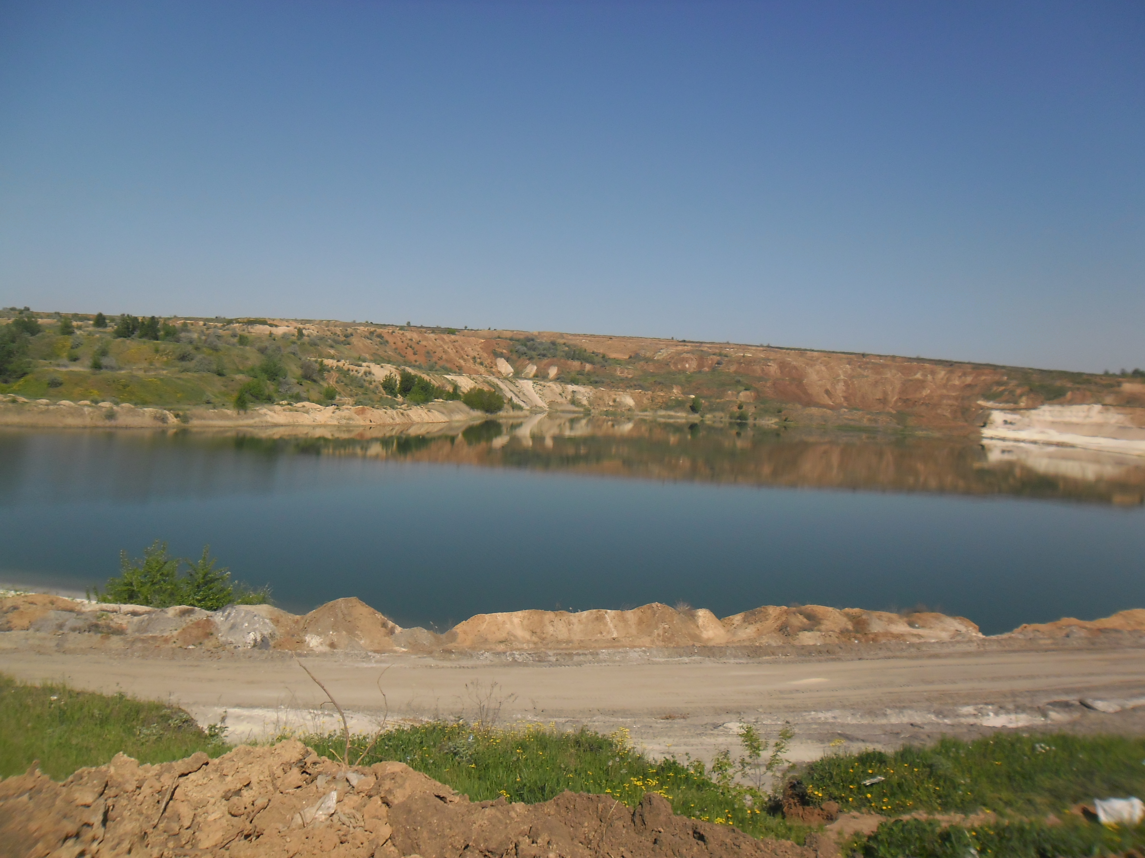 Ставок Новоселівського гірничо-збагачувального комбінату влітку. 2013 рік